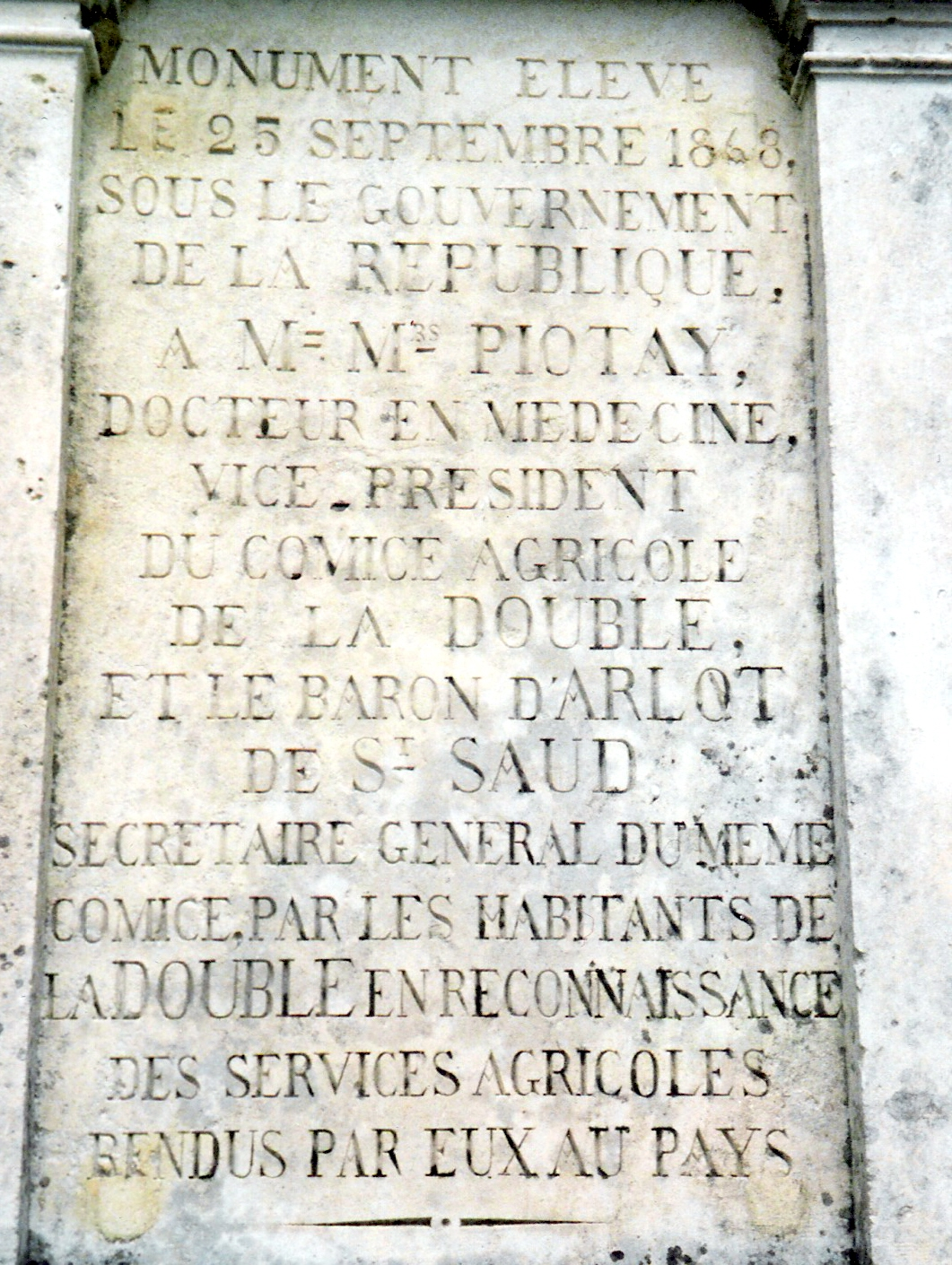 MonumentSaint-SaudEchourgnac.jpg